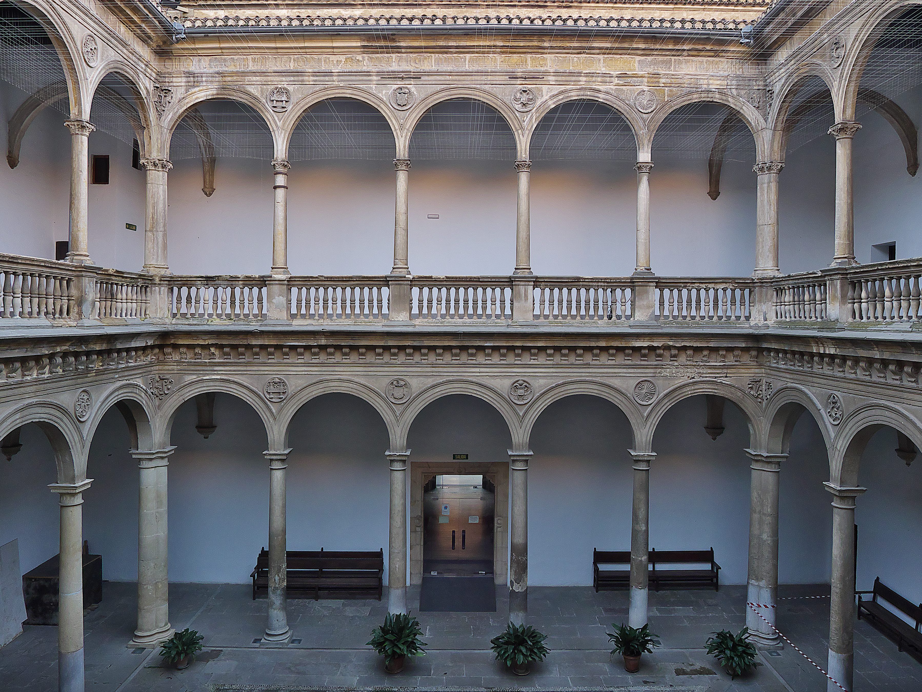 Único patio del hospital que se termina en su totalidad (1536). LLamado de la capilla por encontrarse en él una capilla utilizada durante las obras. Sin documentación sobre la autoría del proyecto, no es descartable la intervención de Diego de Siloé.